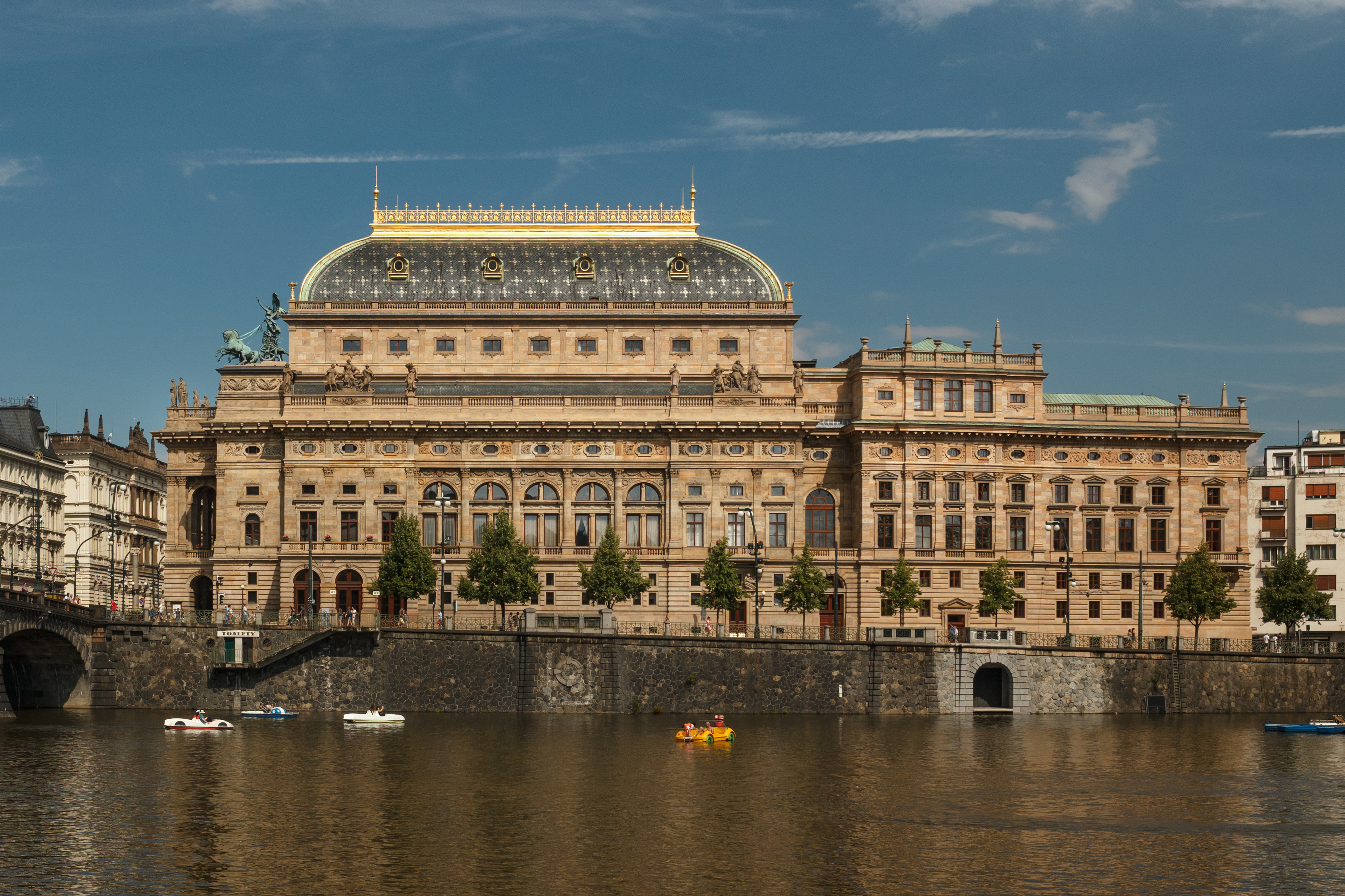 Historická budova Národního divadla po kompletní rekonstrukci fasády a rekonstrukci technologických tunelů.